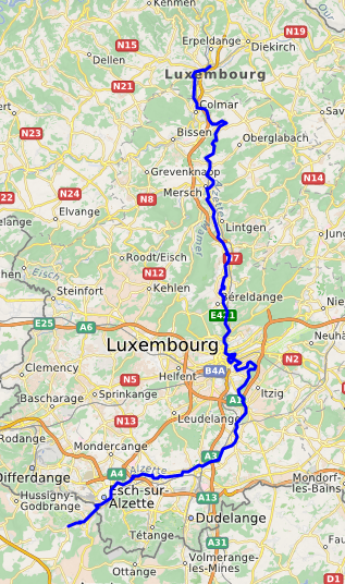 carte réalisée sur umap This map may be incomplete, and may contain errors. Don't rely solely on it for navigation.